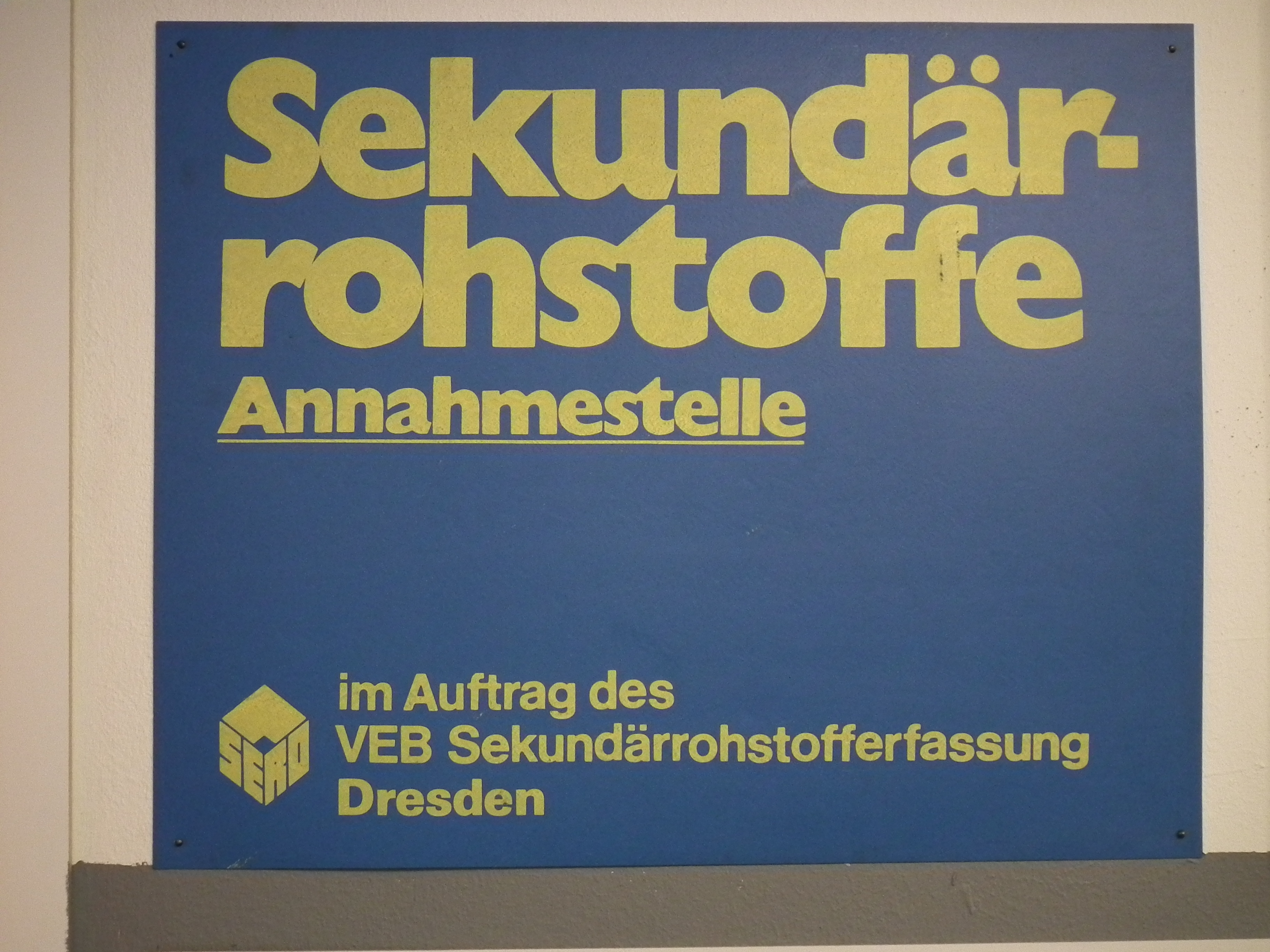 DDR Museum Zeitreise Radebeul, Schild SERO Annahmestelle, Fotografiert mit Genehmigung der Museumsleitung